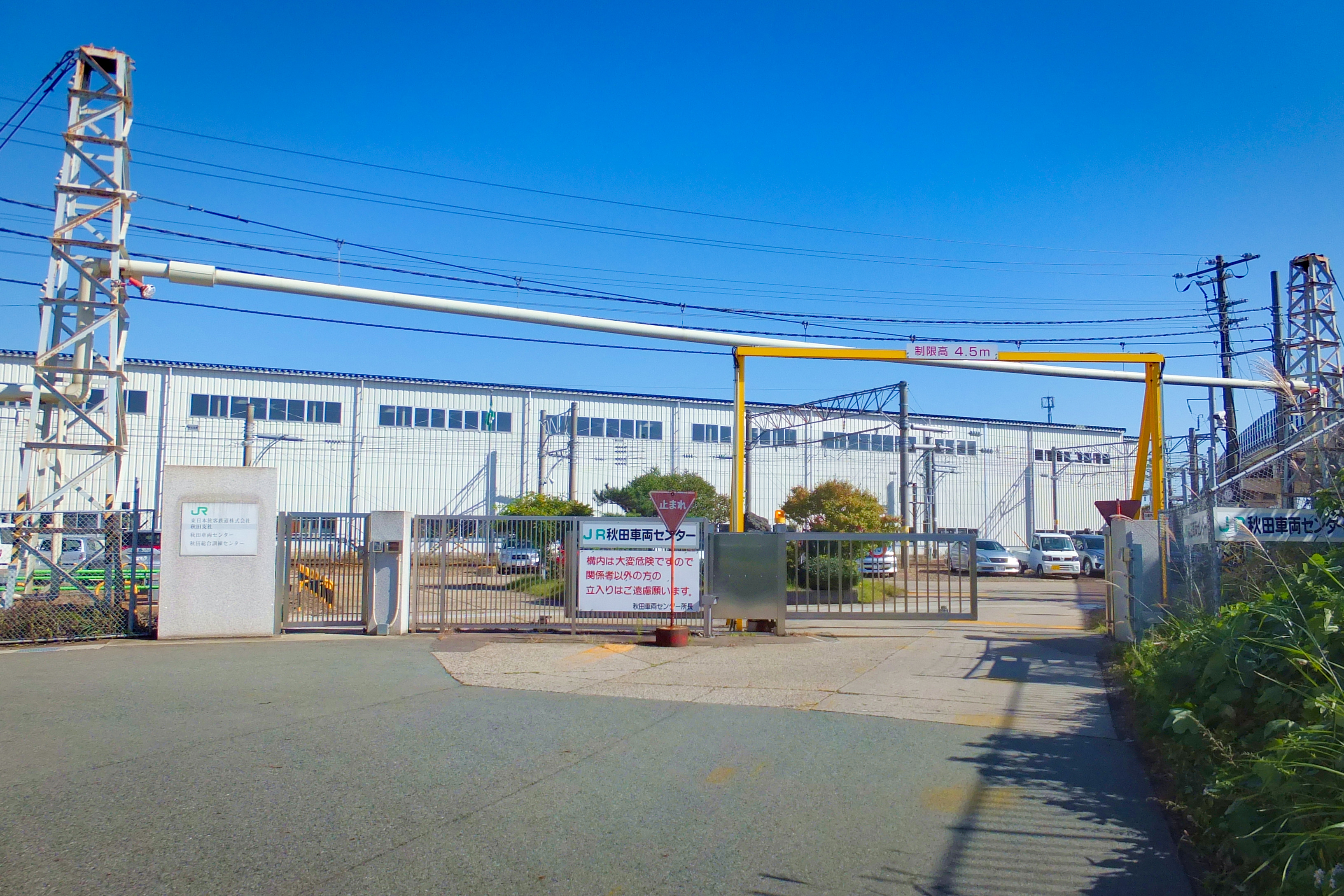 東日本旅客鉄道・秋田車両センター（旧称・南秋田運転所、秋田市楢山城南新町）